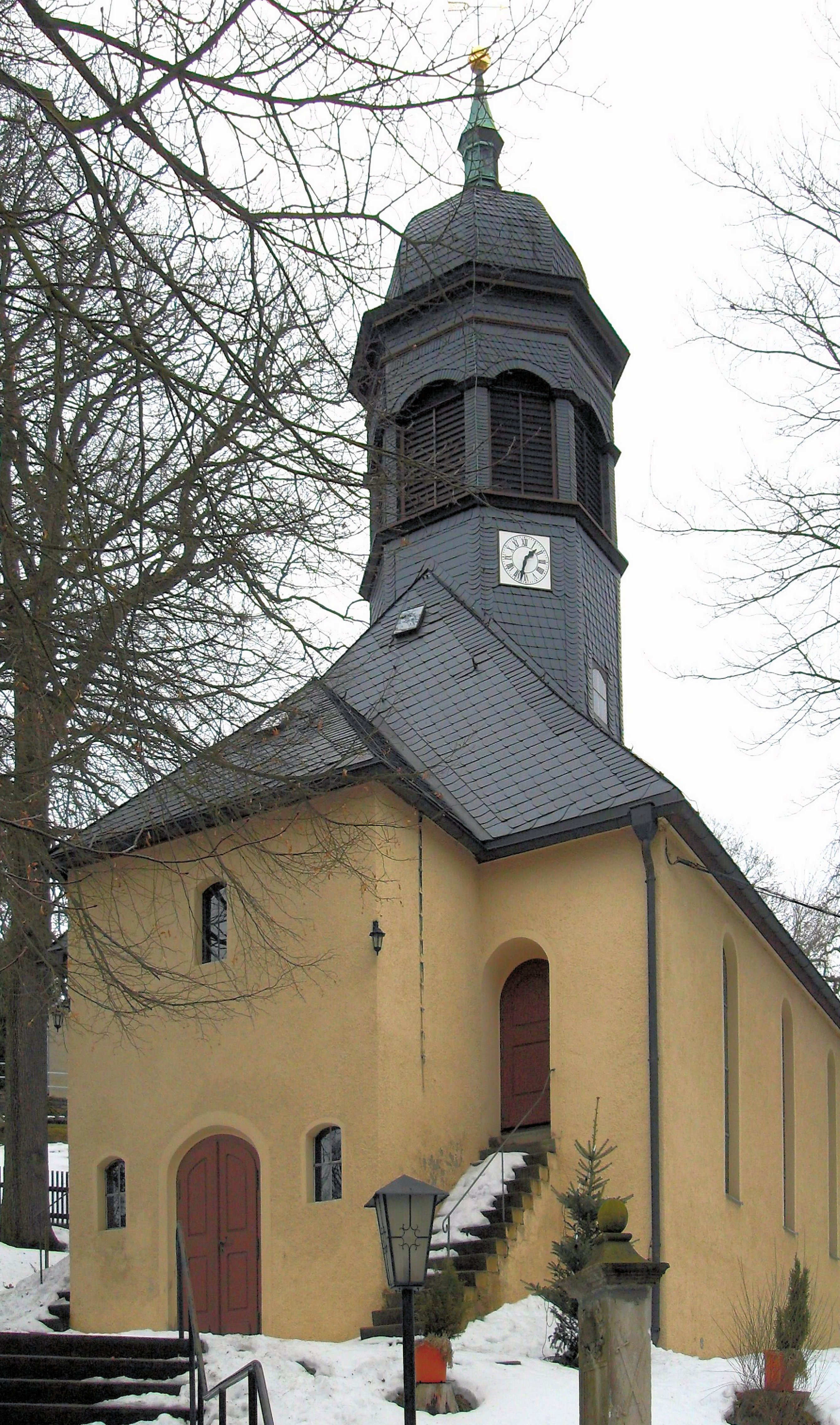 Pfarrkirche Heidersdorf, Erzgebirgskreis, Deutschland